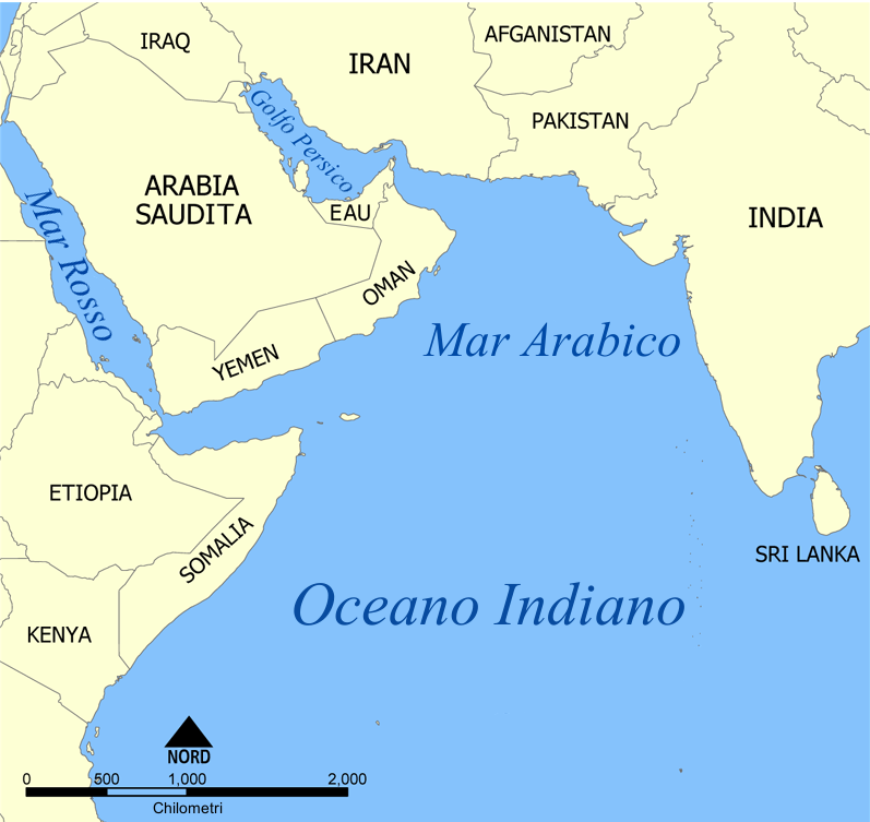 Rifatta sulla versione inglese